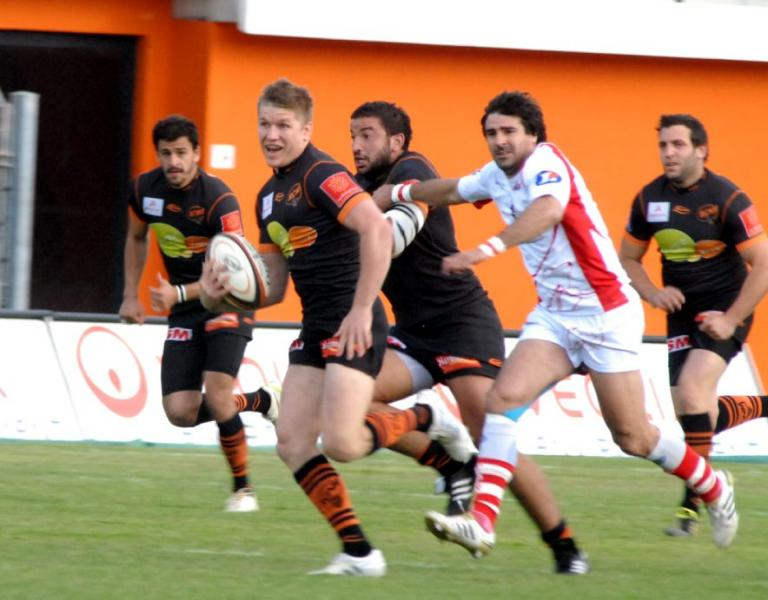 Josh Valentine N°9 du RCNM